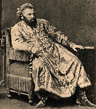 Russian baritone opera singer Ivan Melnikov in Boris Godunov role (1874)